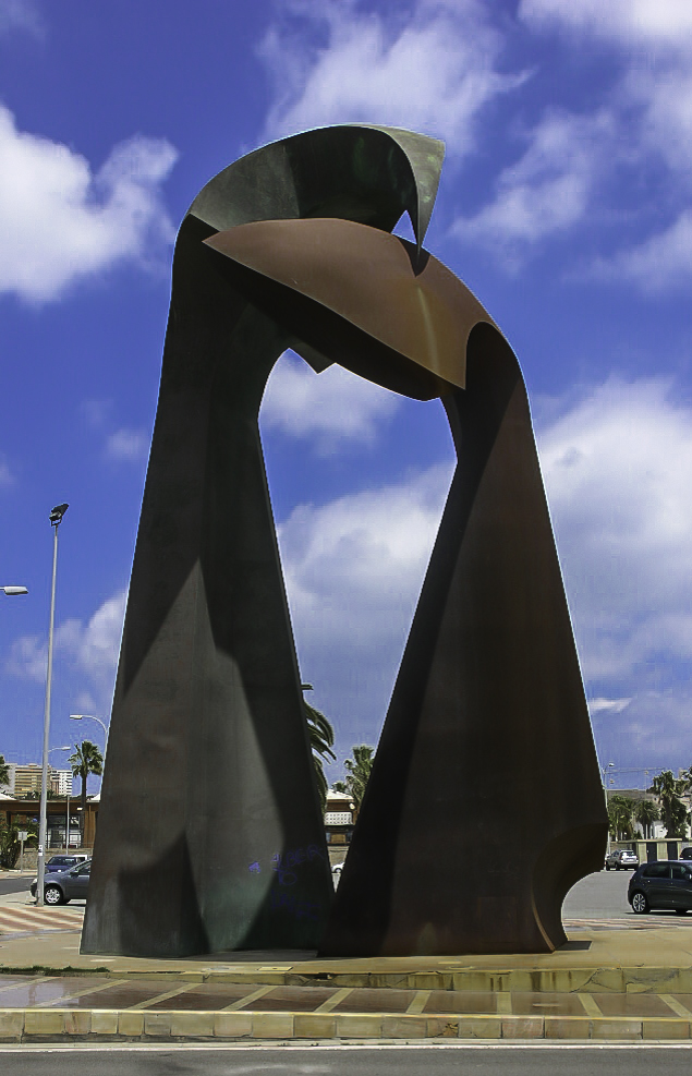 La escultura Encuentros es una obra de Mustafa Arruf que se halla en la Plaza del Consejo de Europa, del Paseo Marítimo Alcalde Rafael Ginel Cañamaque, en Melilla, España.